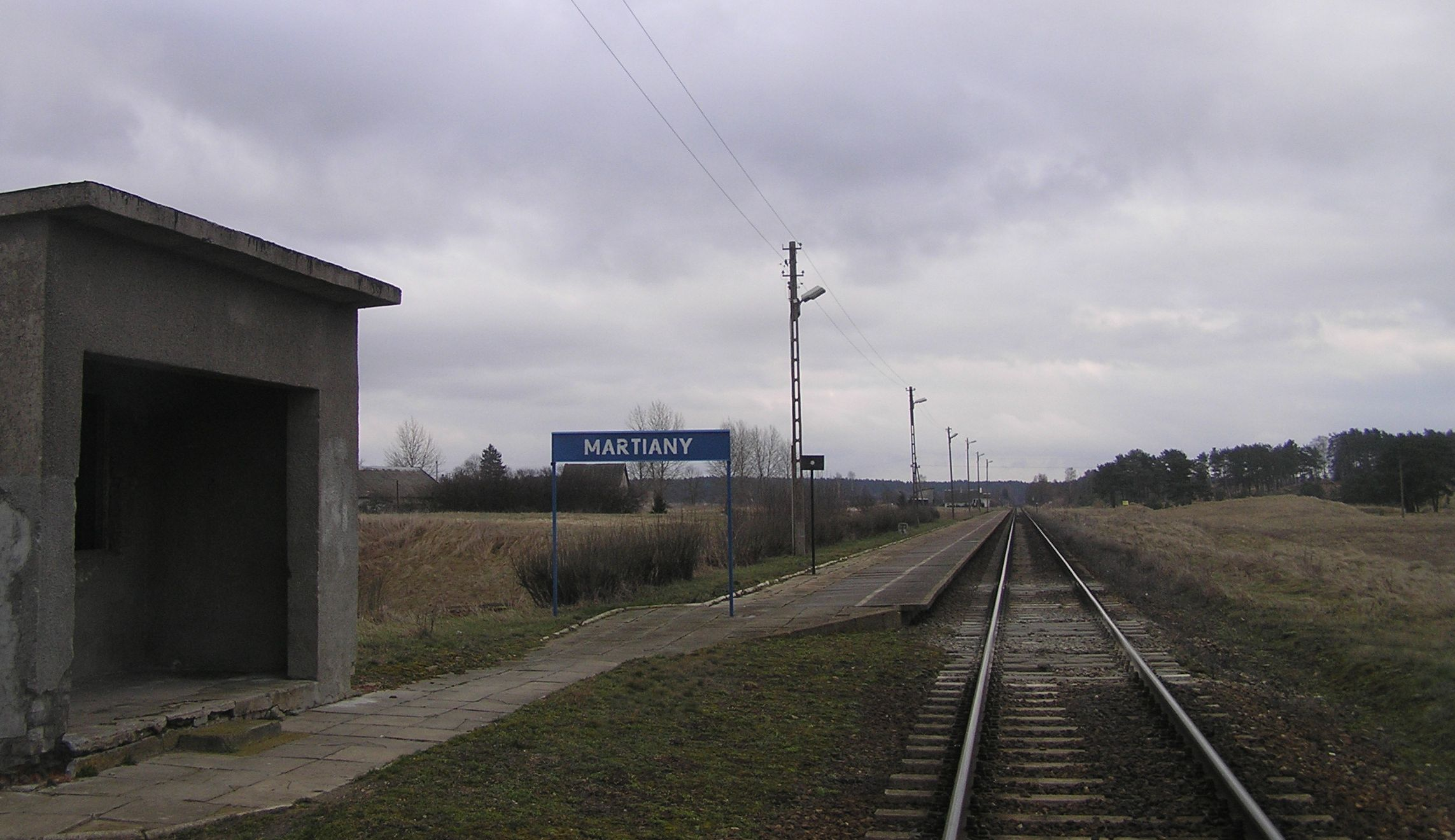 Przystanek kolejowy w Martianach. Widok patrząc w kierunku trasy do Kętrzyna.